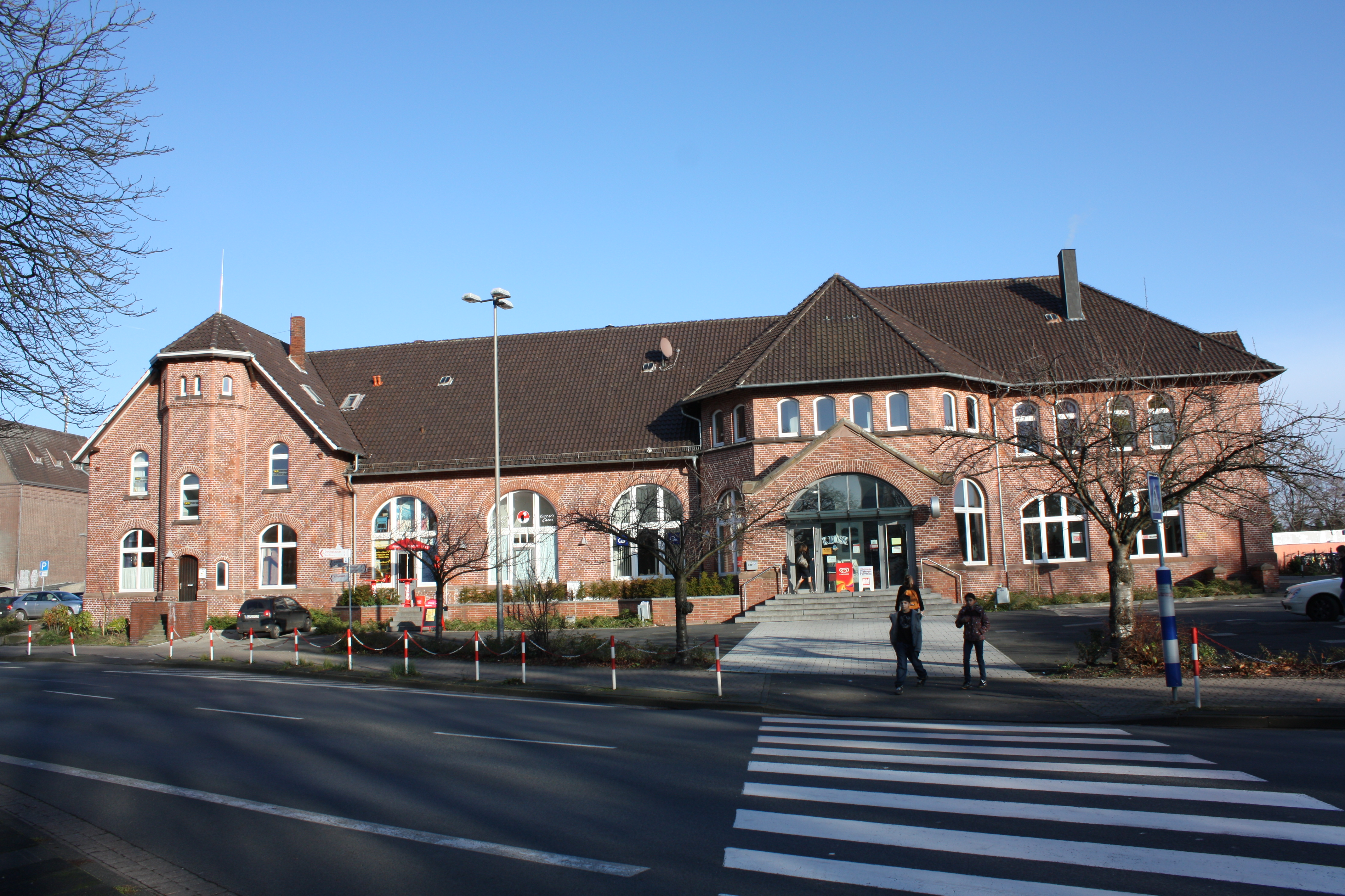 Bahnhof in Lage (Lippe)